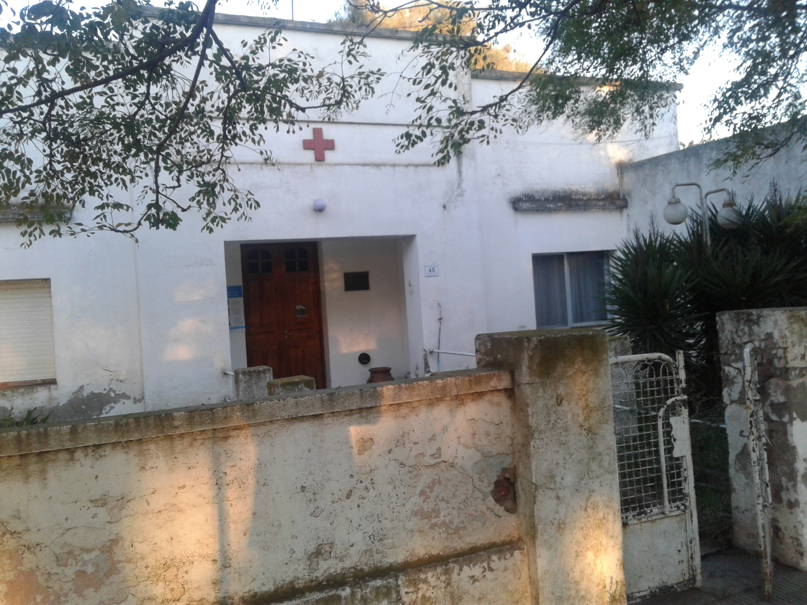 Sala que atiende emergencias en el pueblo de Bajo Hondo